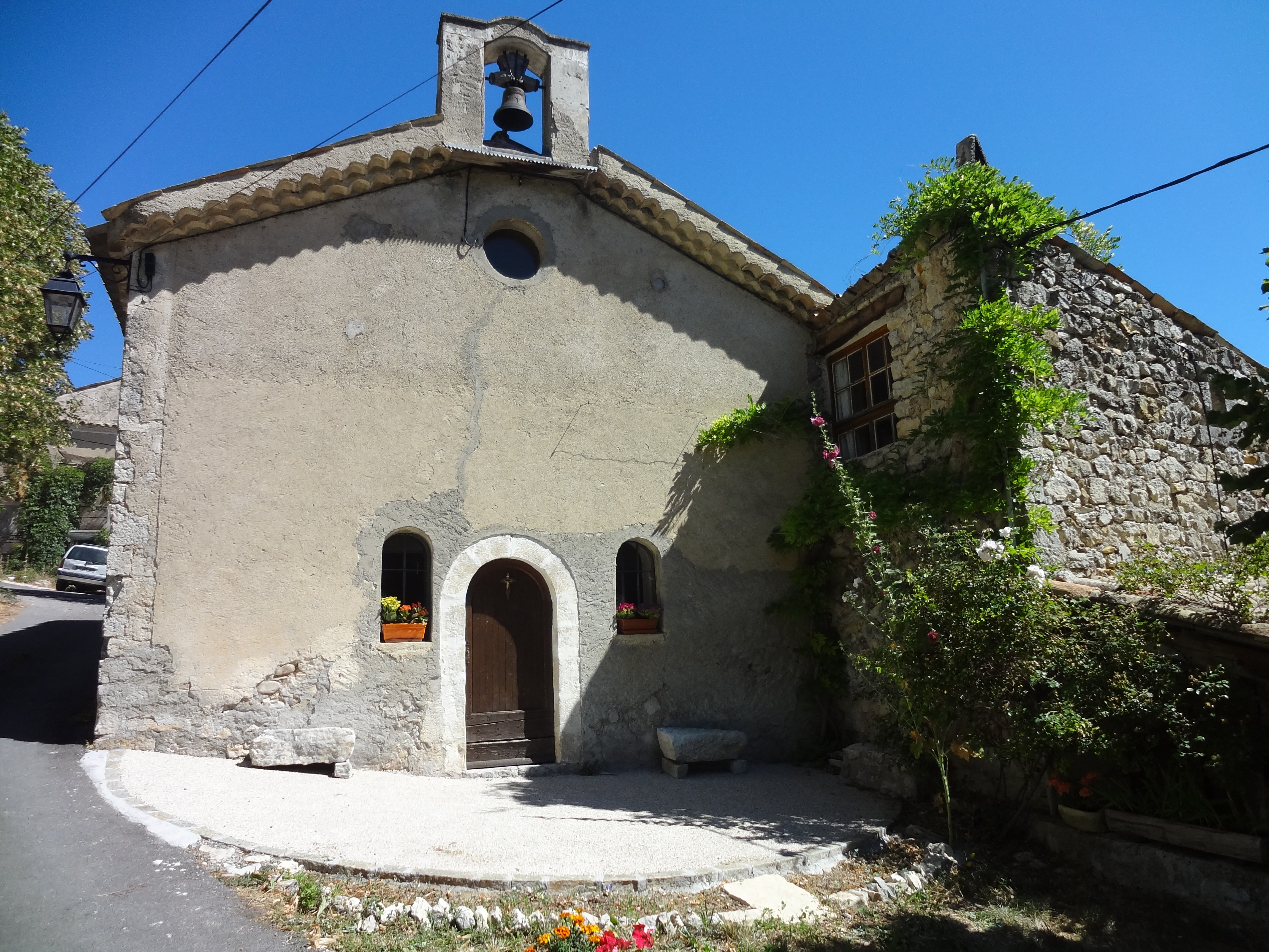 église de Montfroc